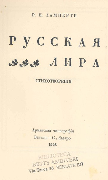 Образец издания армянской типографии в Венеции на русском языке